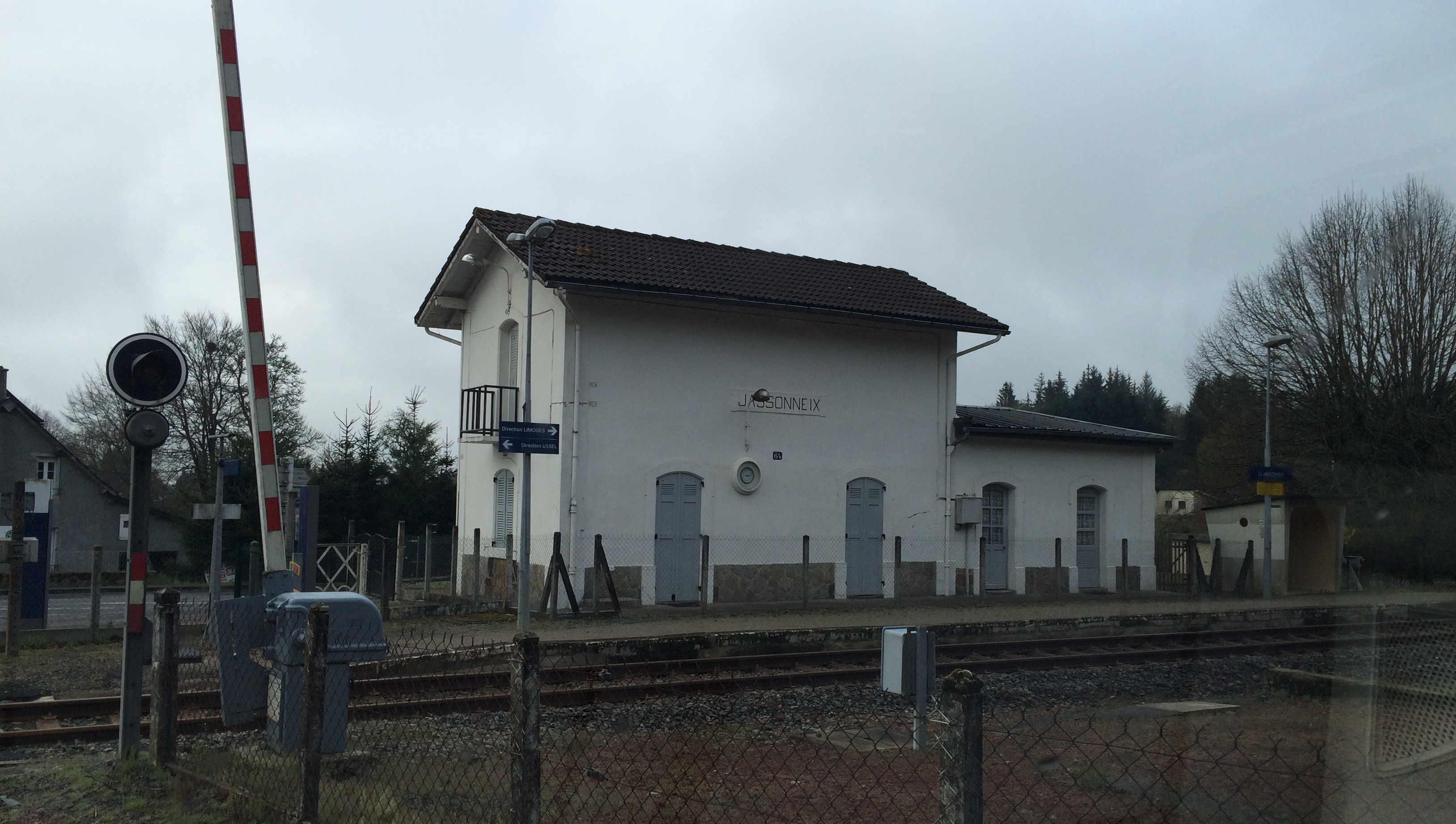 Gare de Jassonneix